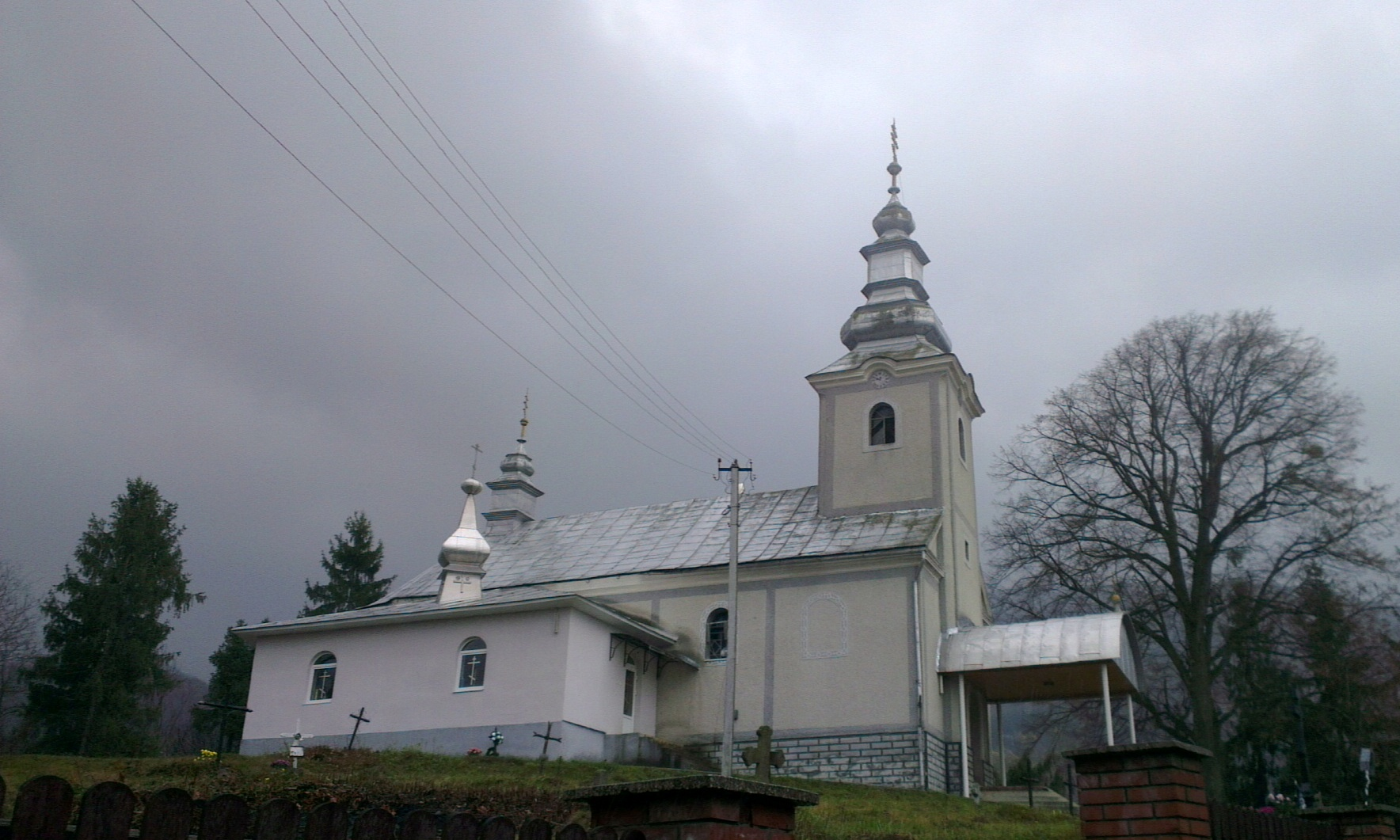 Православная церковь в селе Поляна, Свалявский район, Закарпатье